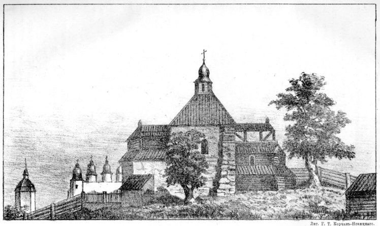 Церква влаштована із залишків колишньої Десятинної церкви митрополитом Петром Могилою.